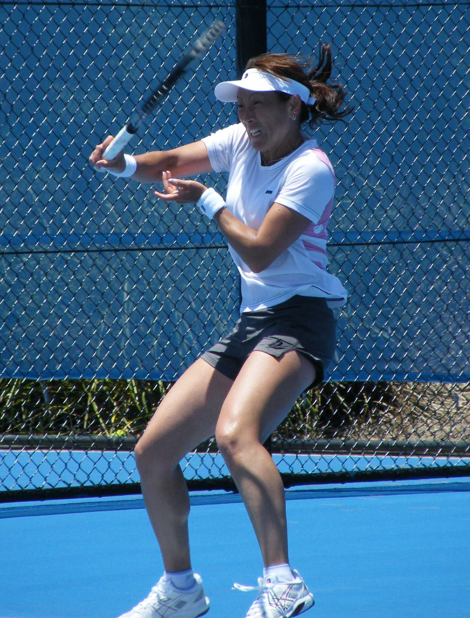 Ai Sugiyama of Japan - NSW Open, January 2009.